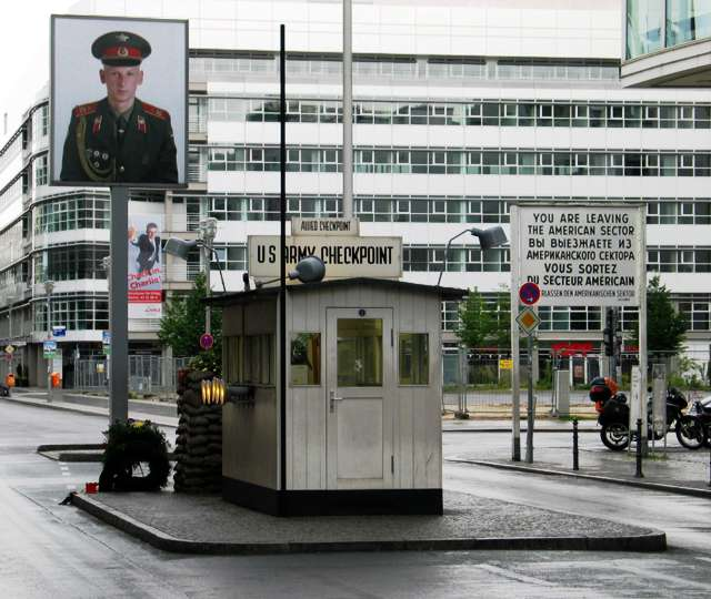 Checkpoint Charlie, Friedrichstrasse, Berlin (2005)